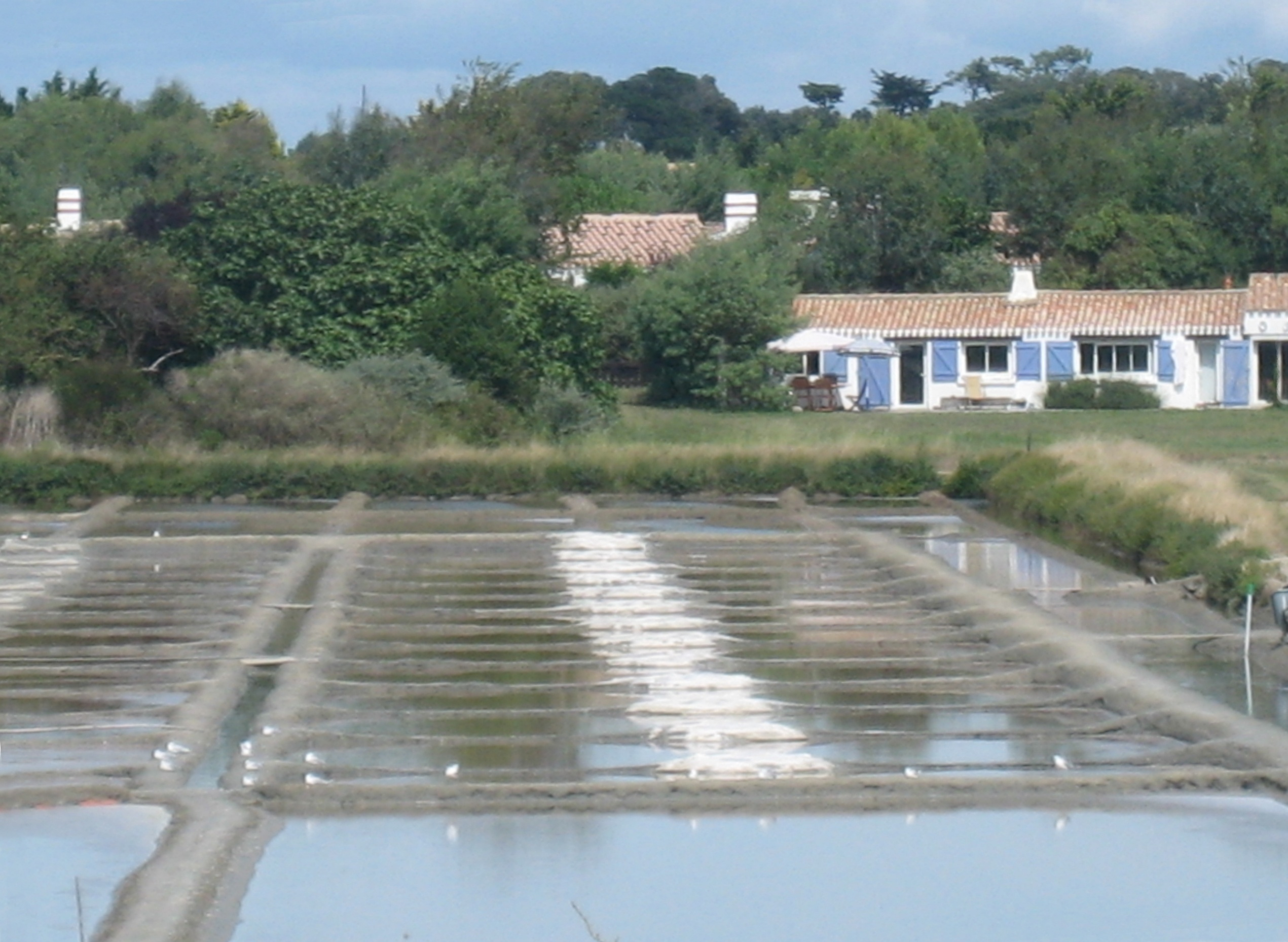 Eigen foto